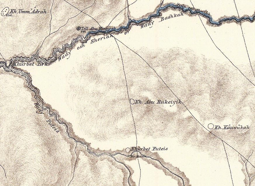 מפה חורבת פטיש, 1880